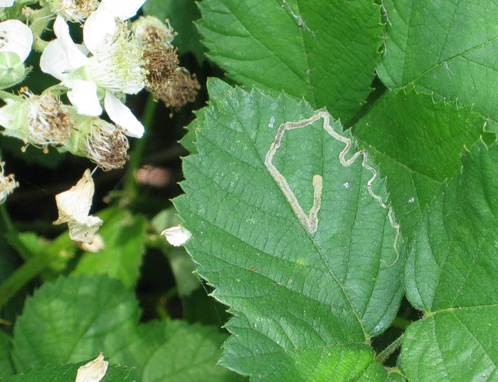 Mine von Stigmella aurella var.biol. aurella